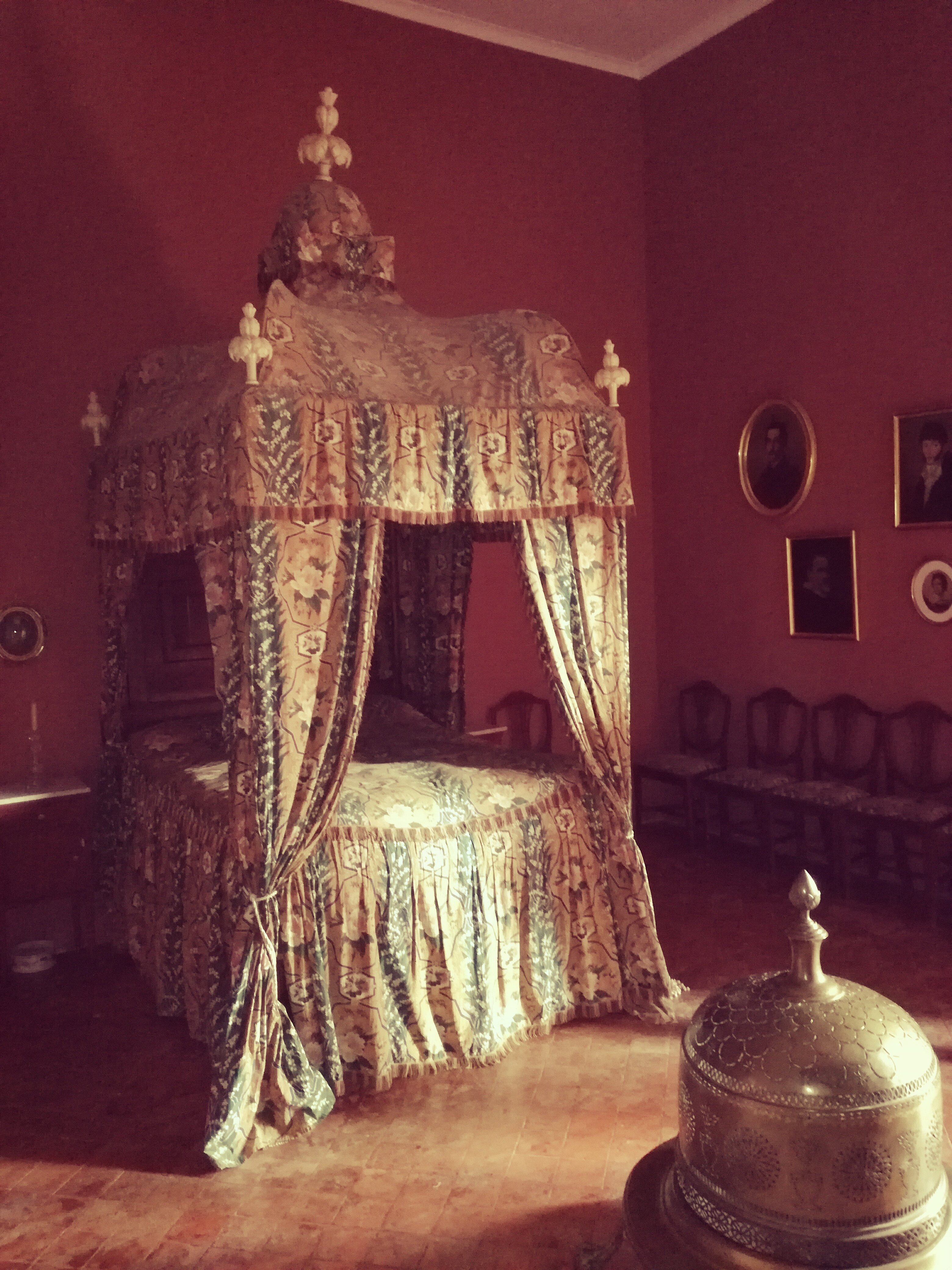 Habitació on morí el poeta Manuel de Cabanyes a l'edat de 25 anys.